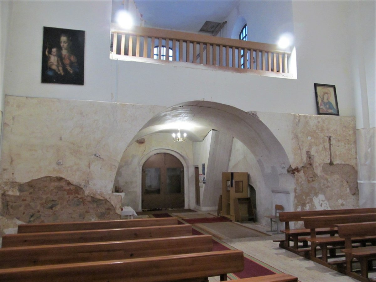 Замосце. Касцёл Святой Барбары. Інтэр'ер